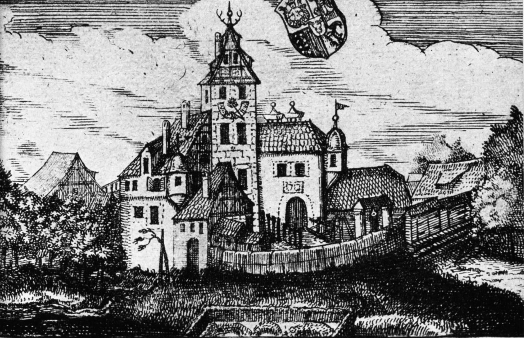 Kupferstich, das Rieterschloss in Kornburg